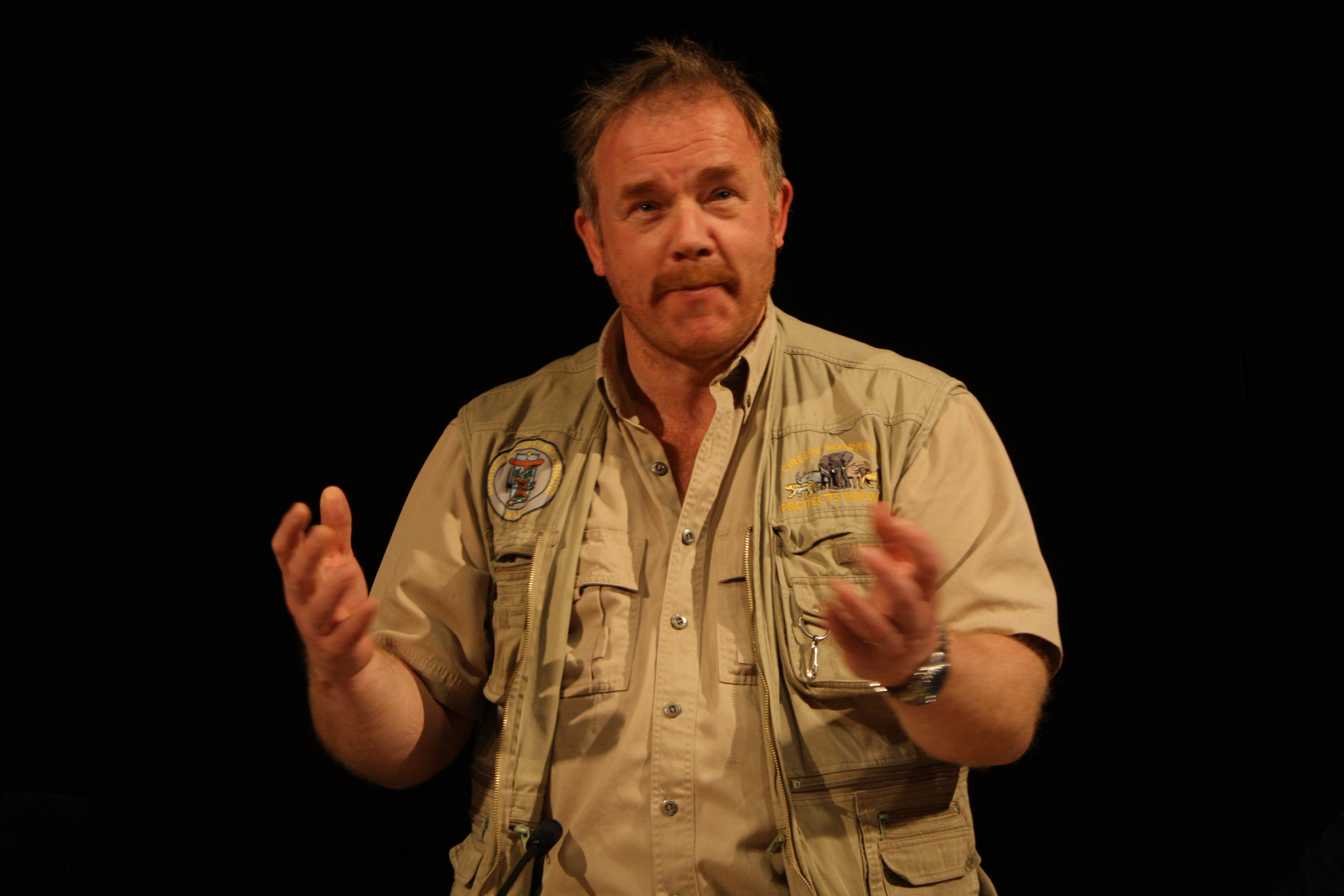 Kurt Oddekalv fra Miljøvernforbundet i paneldebatt under Røros-konferansen.